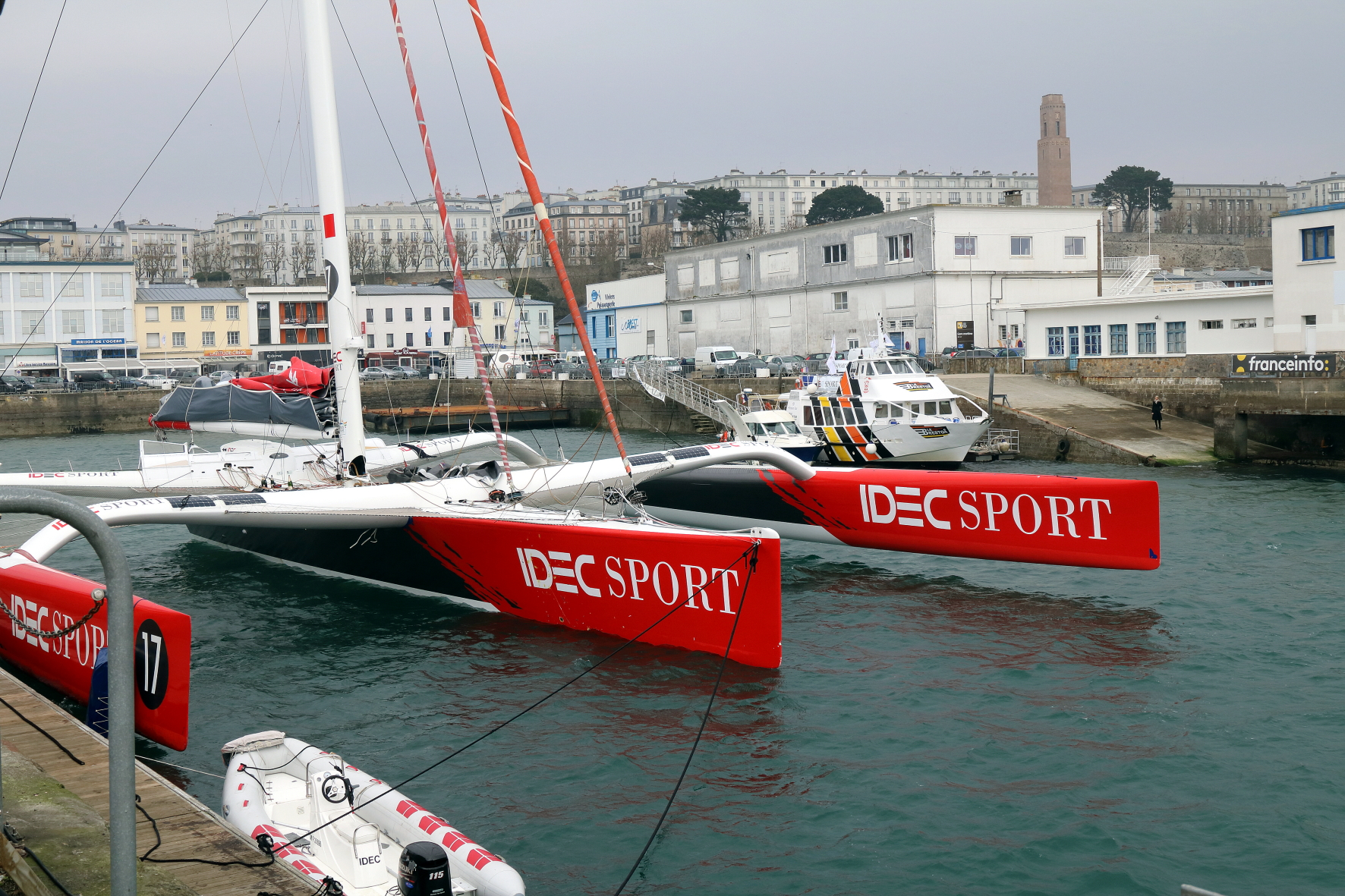 Arrivée de Francis Joyon et de l'équipage du maxi trimaran Idec Sport à Brest après leur record en 40 jours autour du monde, le 26 janvier 2017.